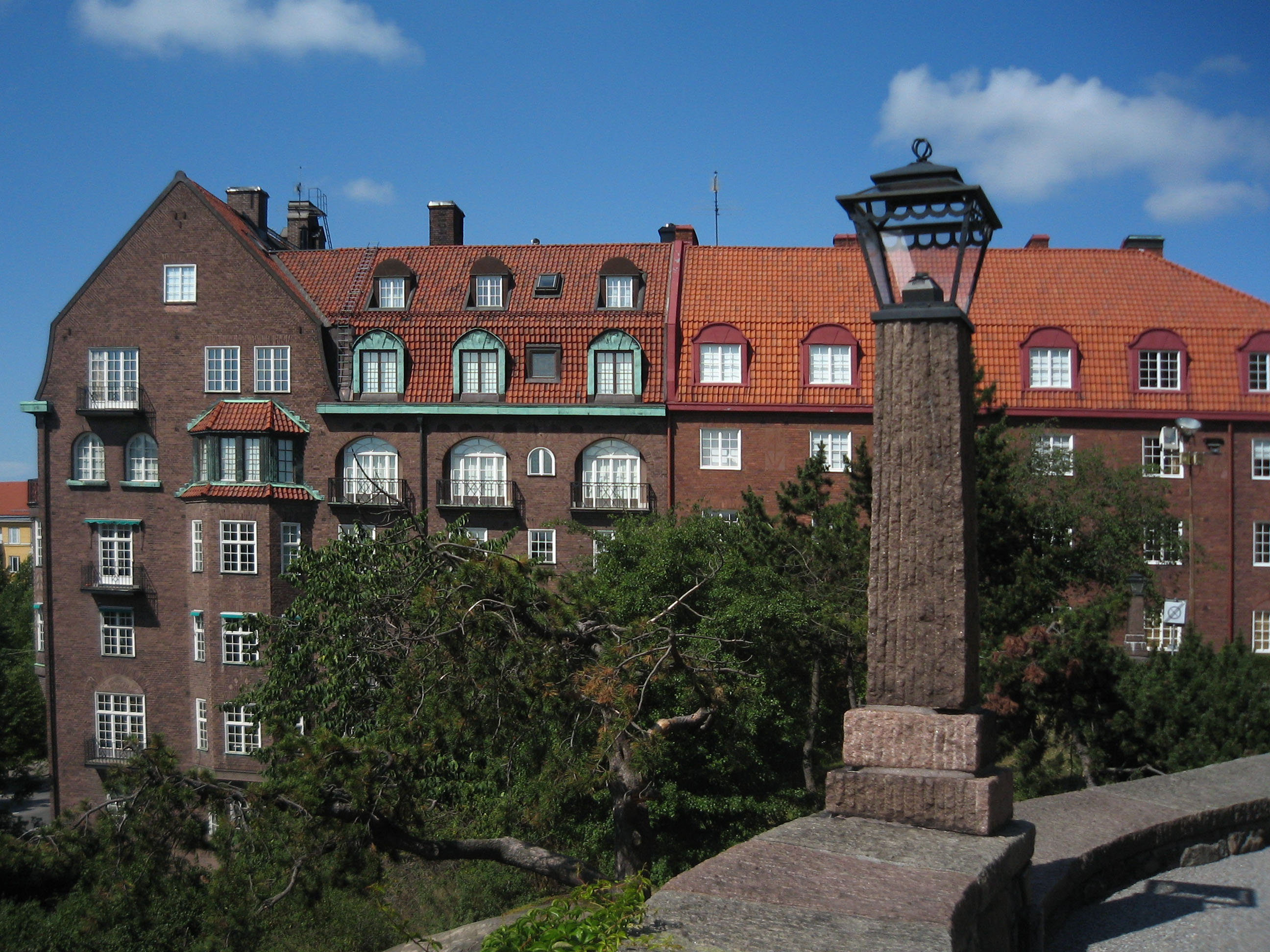 Lärkstaden, Stockholm. Från vänster; Engelbrekts Kyrkogata 1/Karlavägen 11 (Skatan 1): Byggnadsår 1912-13, arkitekter Höög & Morssing, byggherre A Pettersson & P Östlihn, byggmästare P Östlihn. Engelbrekts Kyrkogata 3/Bragevägen 1, 3 (Skatan 13): Byggnadsår 1915-16, arkitekt A Wallby, byggherre och byggmästare 1) AB Cognatio/N Holmström 2) E G Karlsson.